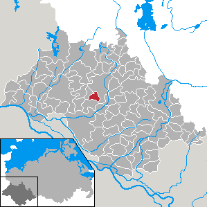 Pätow-Steegen in Mecklenburg-Vorpommern - district Ludwigslust